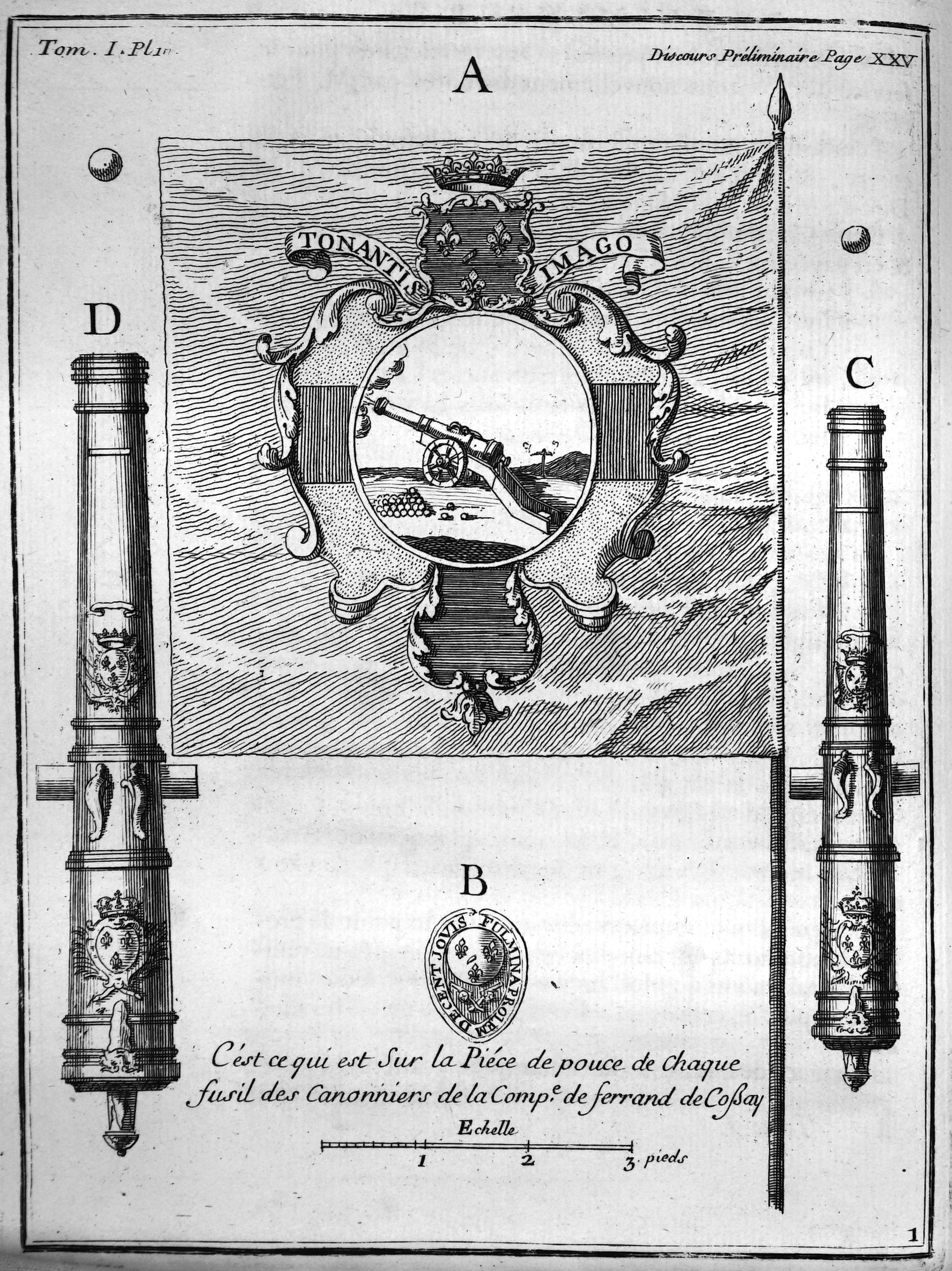 Mémoires d'artillerie, recueillis par M. Surirey de Saint Remy, exemplaire de la B.M. de Reims, troisième édition.